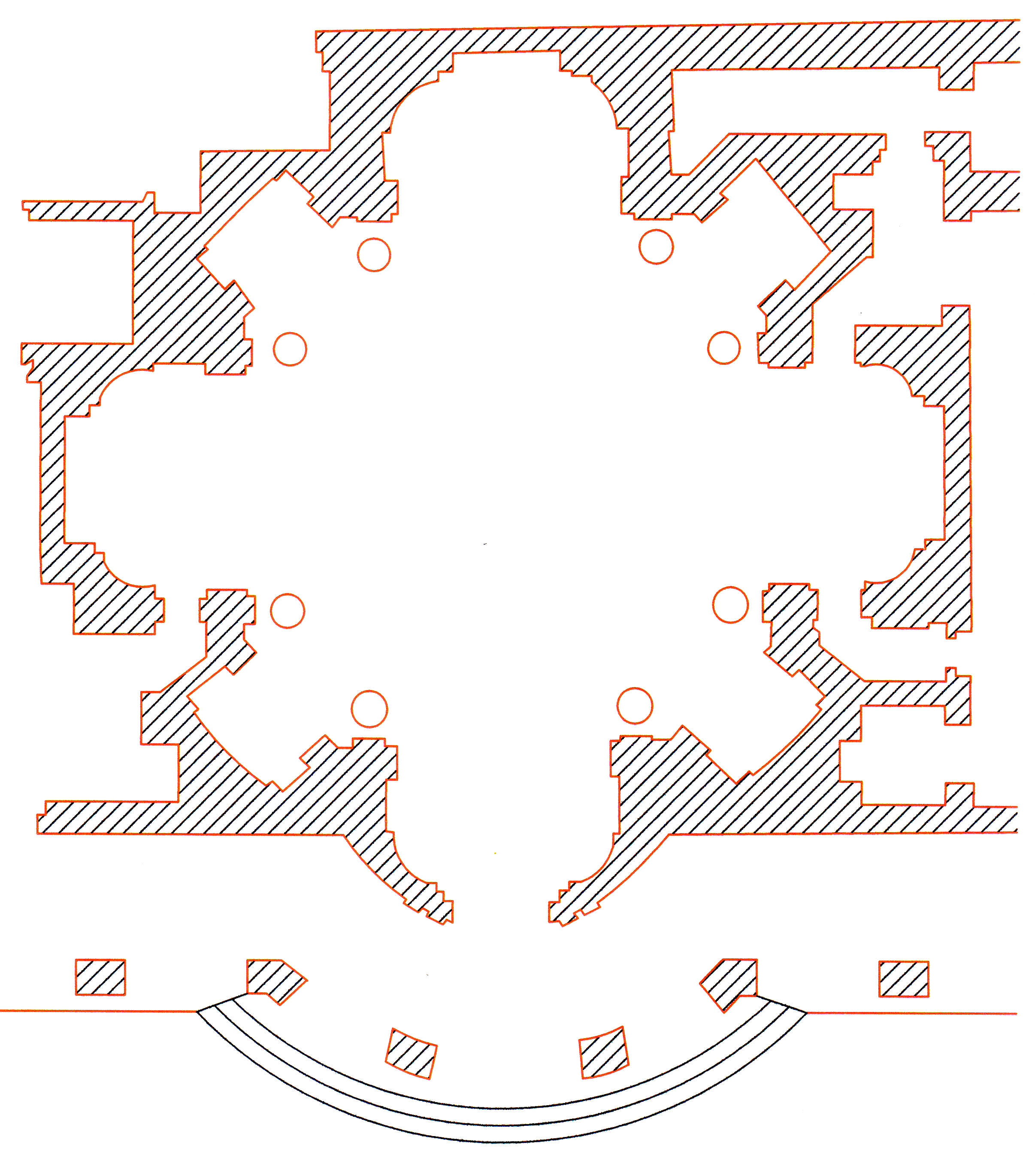 Pizzofacone church: plan